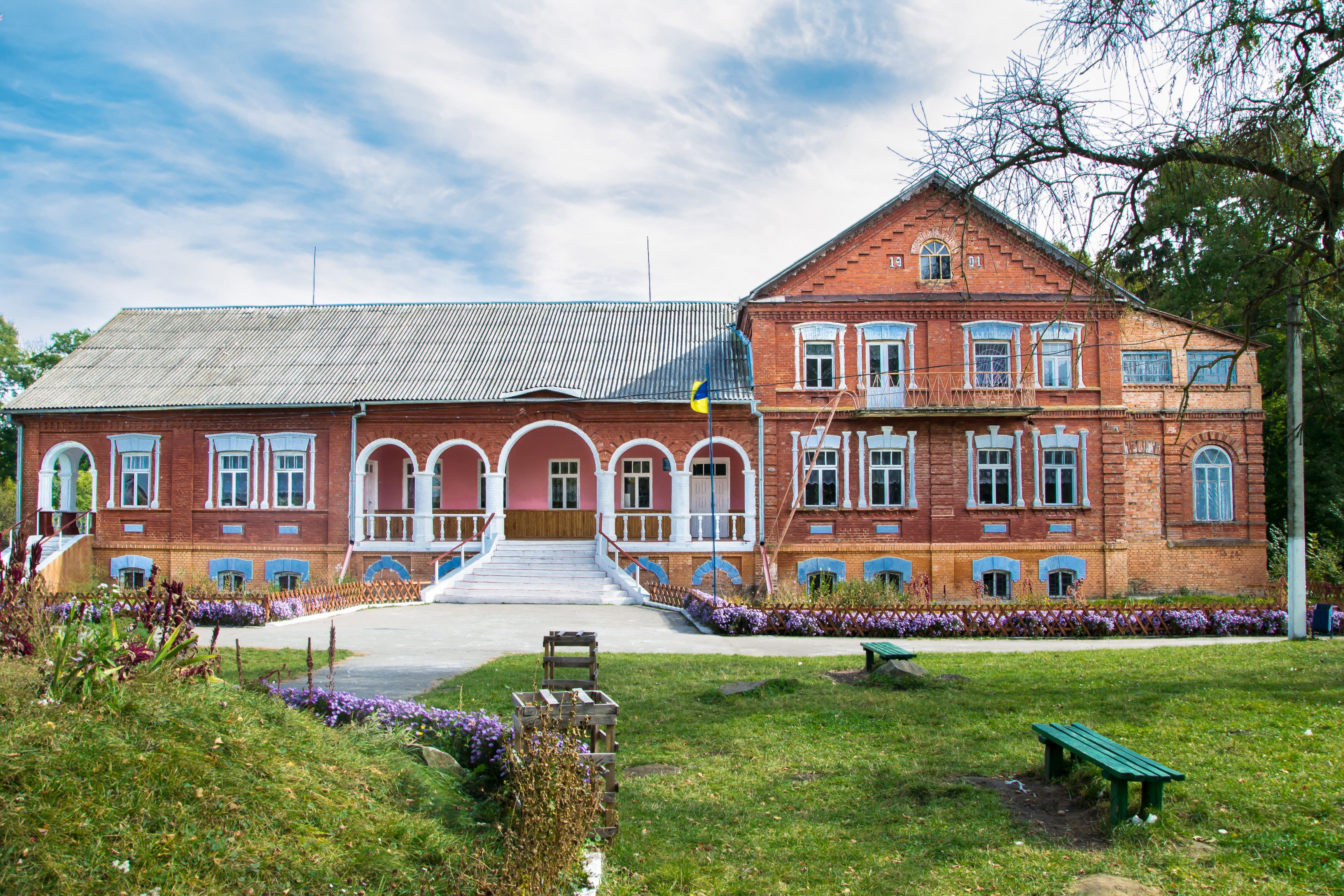 Садибний будинок Колонна-Чесновського, село Божиківці